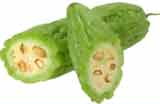 bitter melon